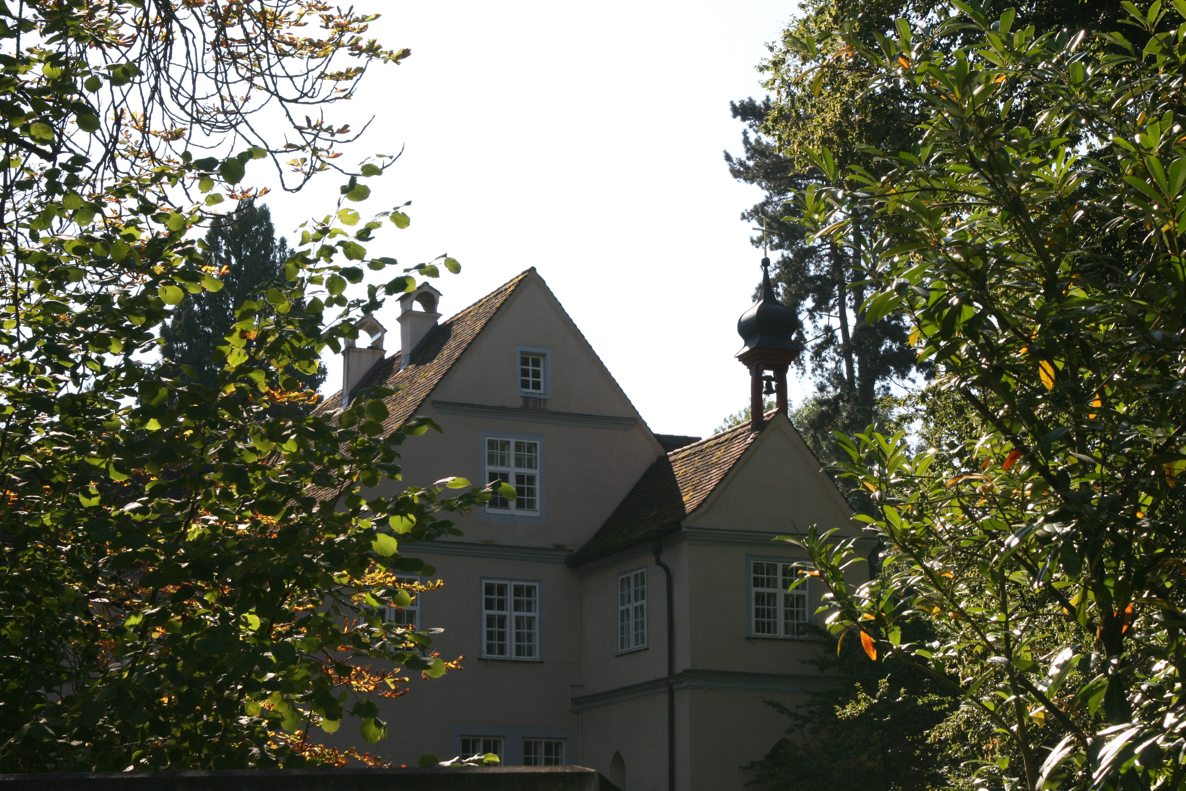 Schloss Burgberg, Carl-Valentin-Weg in Überlingen